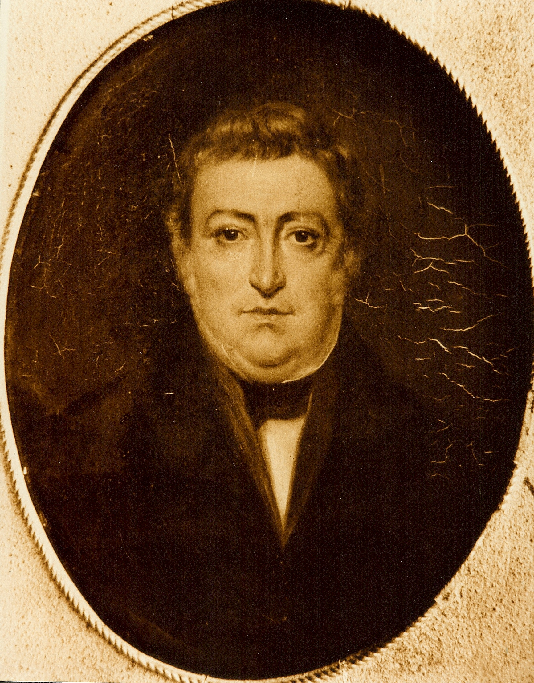 Fotografía de Pintura familiar del S. XIX.